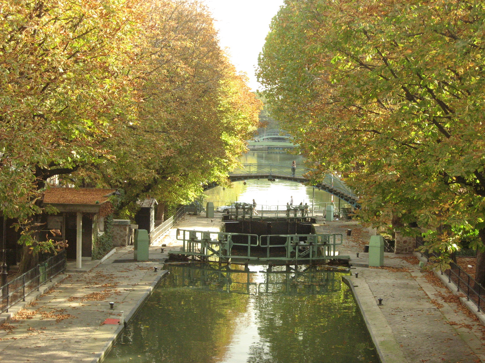 Canal Saint-Martin